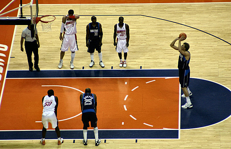 Freiwurf Dirk Nowitzki beim NBA Spiel der Dallas Mavericks gegen den Gastgeber Charlotte Bobcats.